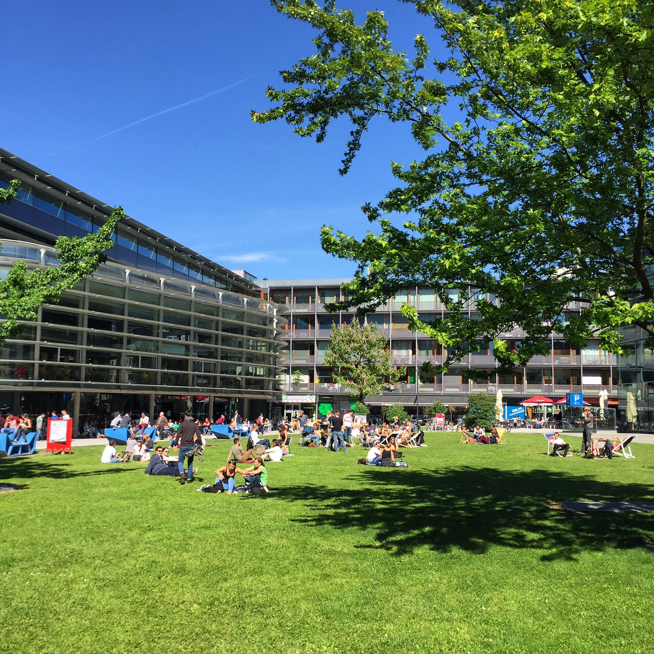 Blick auf den Campus Universitätsstraße der Uni Innsbruck mit dem Gebäude der Sozial- und Wirtschaftswissenschaftlichen Fakultäten im Hintergrund.